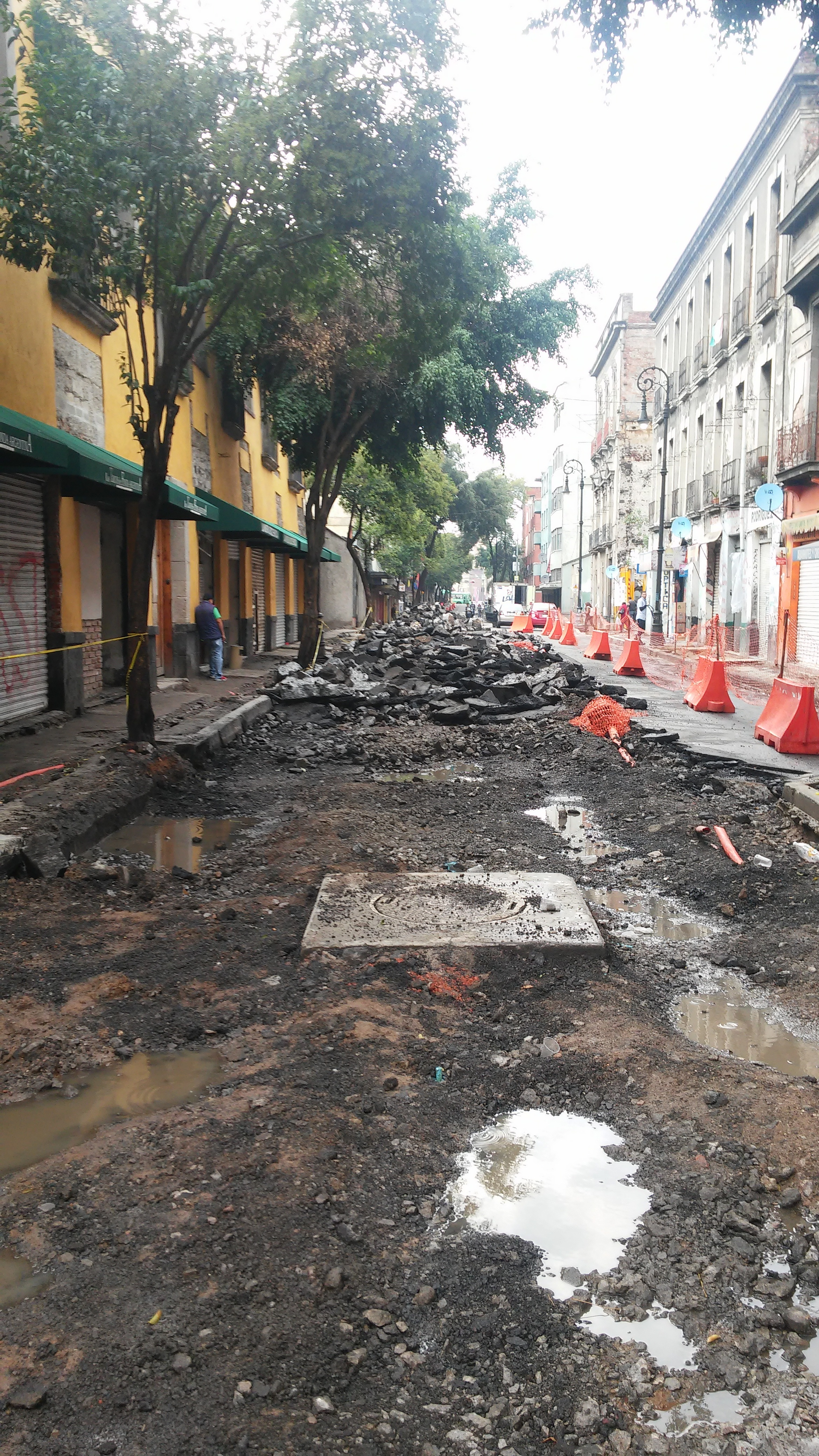 Vista de la calle República de Cuba en remodelación